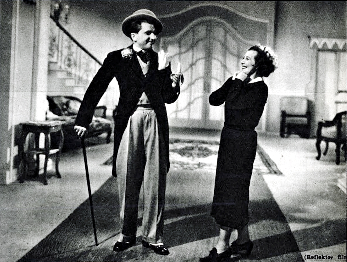 Páger Antal és Vaszary Piri A férfi mind őrült című 1937-es filmben